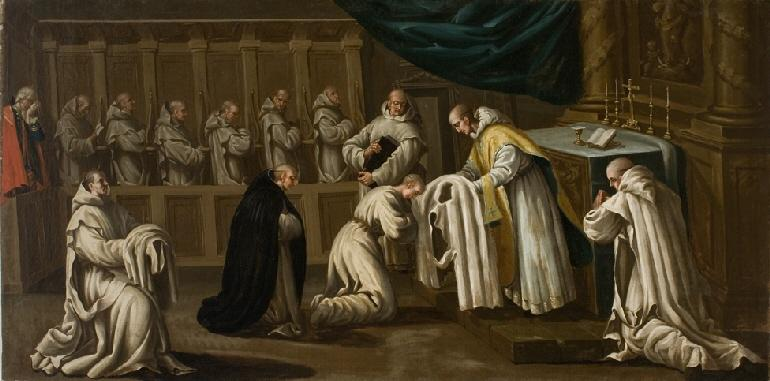 La obra representa a San Bruno de Colonia, el fundador de la Orden de los cartujos, imponiéndole el hábito a un postulante.